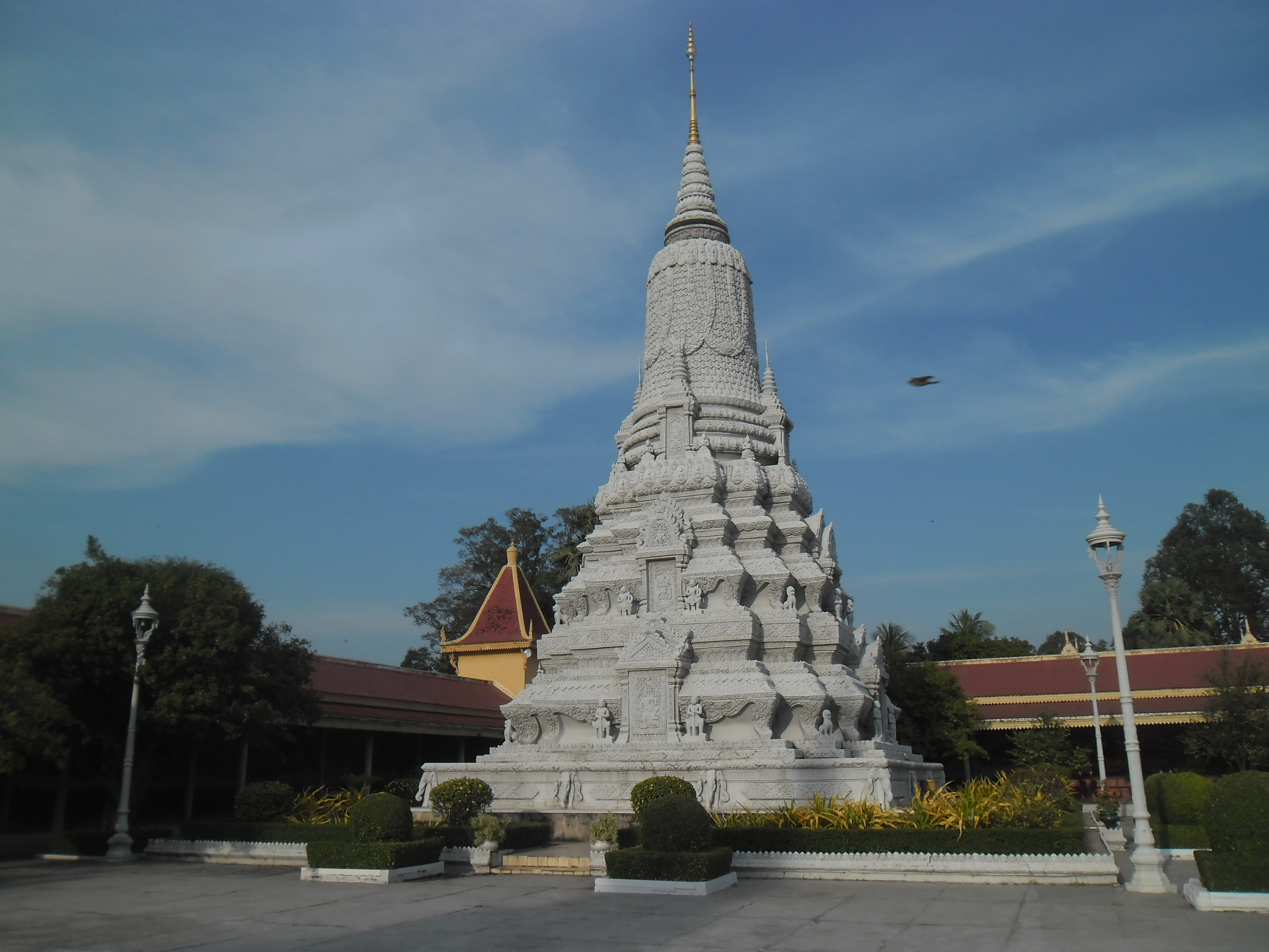 stupa u Phnom Penhu